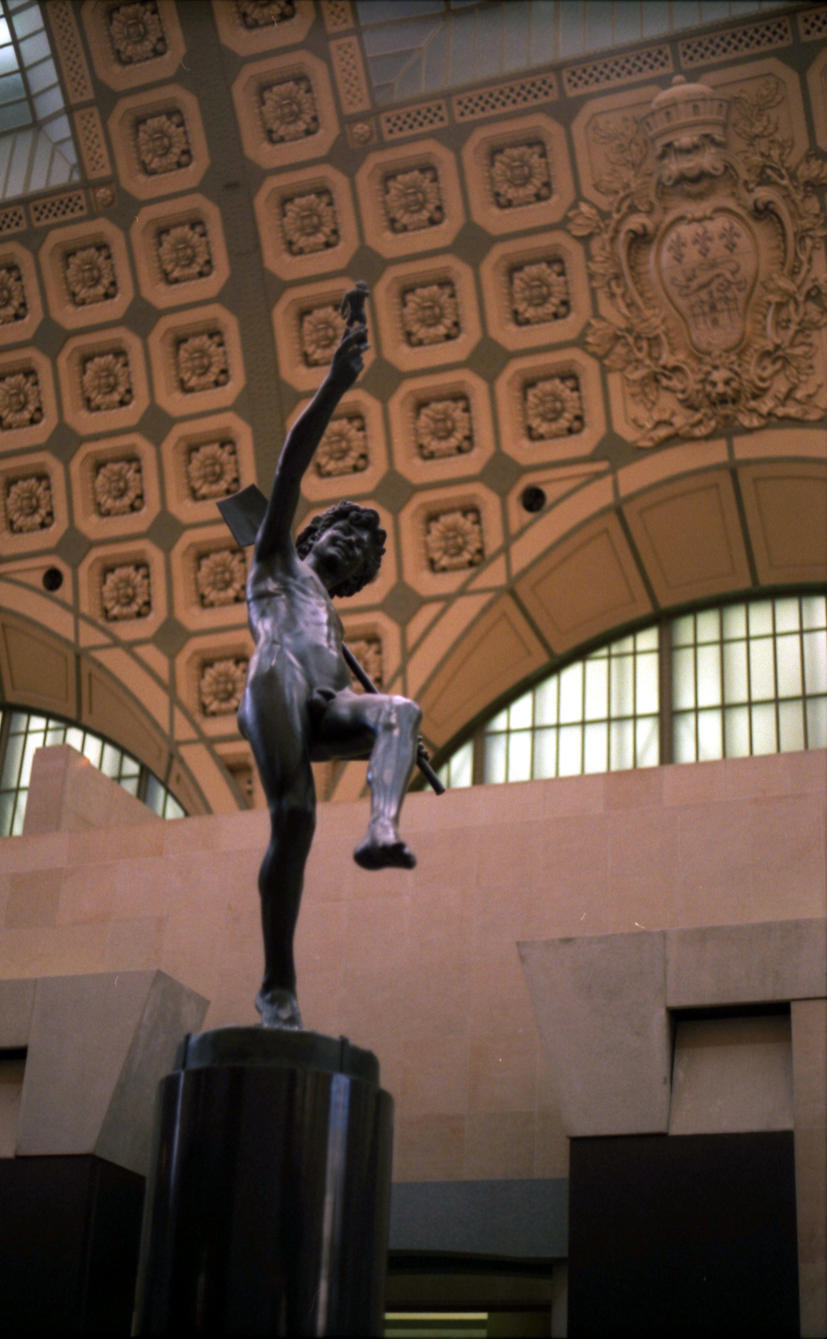 "Trouvaille à Pompéi", 1863 (bronze fondu par Jacquier)